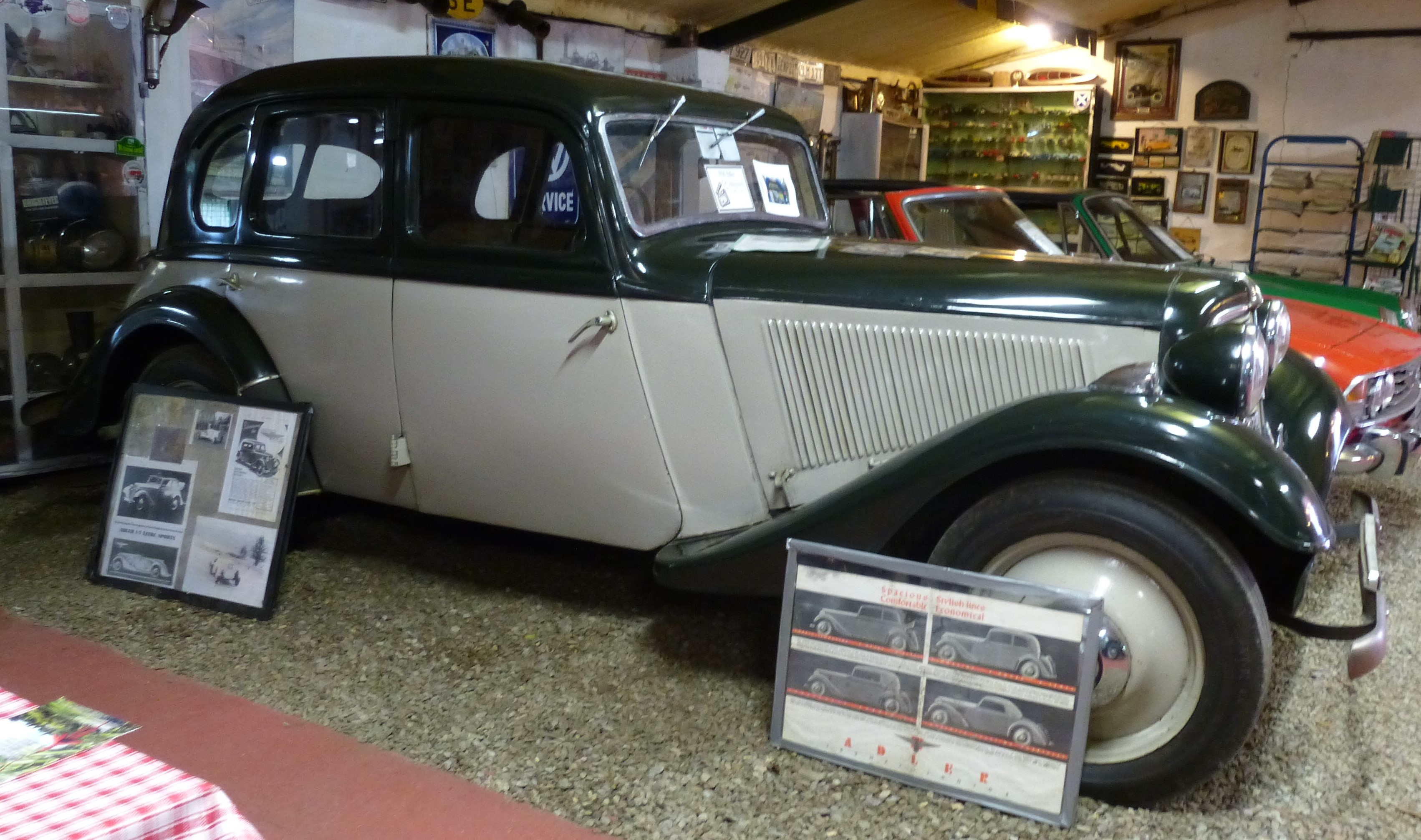 Adler Trumpf Junior von 1936 von Irish Exporters & Importers aus Irland